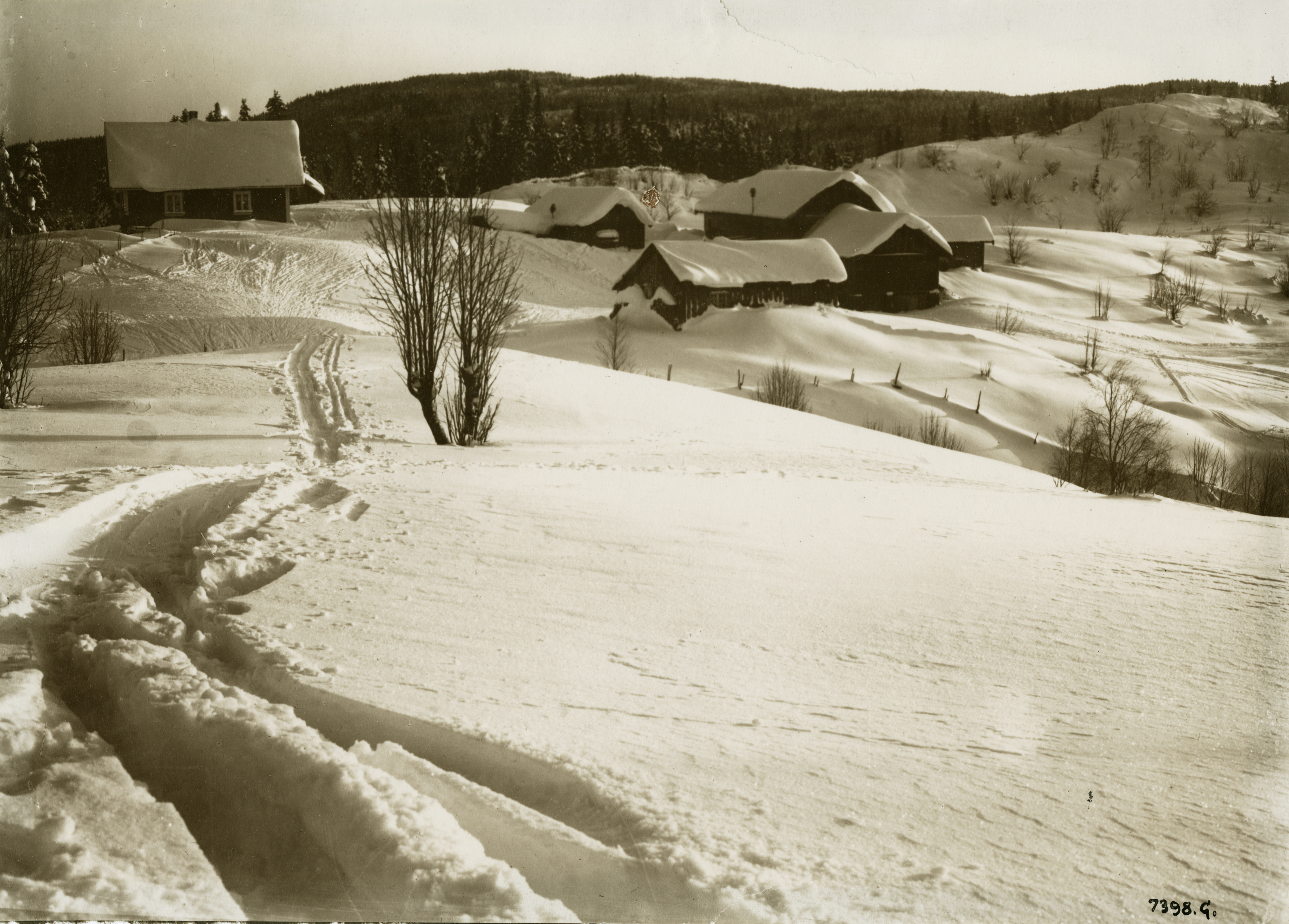 Blankvannsbråten i Vestre Aker, Oslo This image on crowdsourcing geotagging platform Fotodugnad